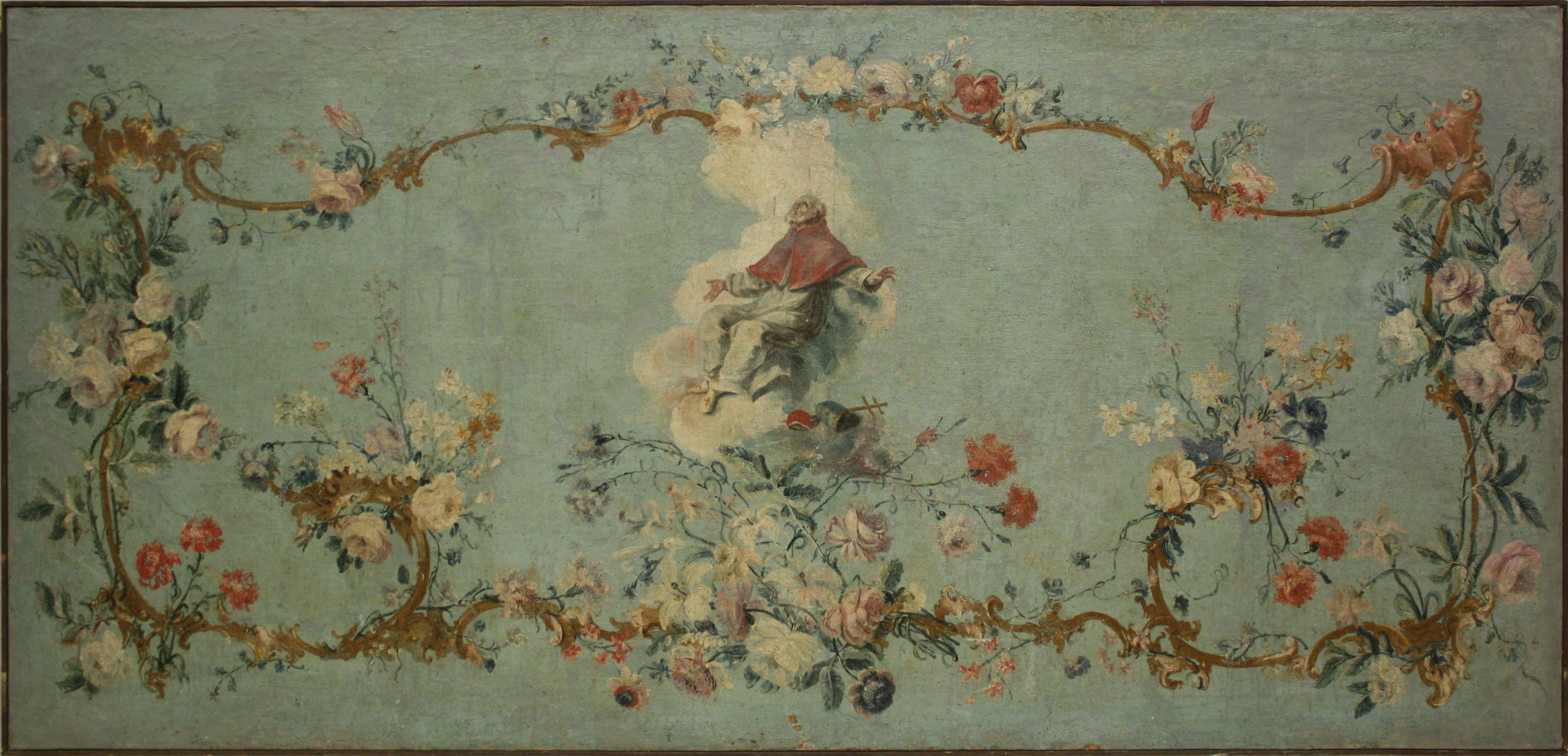 Paliotto d'altare raffigurante la Gloria di San Gregorio magno, olio su tela. Opera di Biagio Bellotti conservato presso la chiesa di San Gregorio Magno in Camposanto a Busto Arsizio. This is a photo of a monument which is part of cultural heritage of Italy.